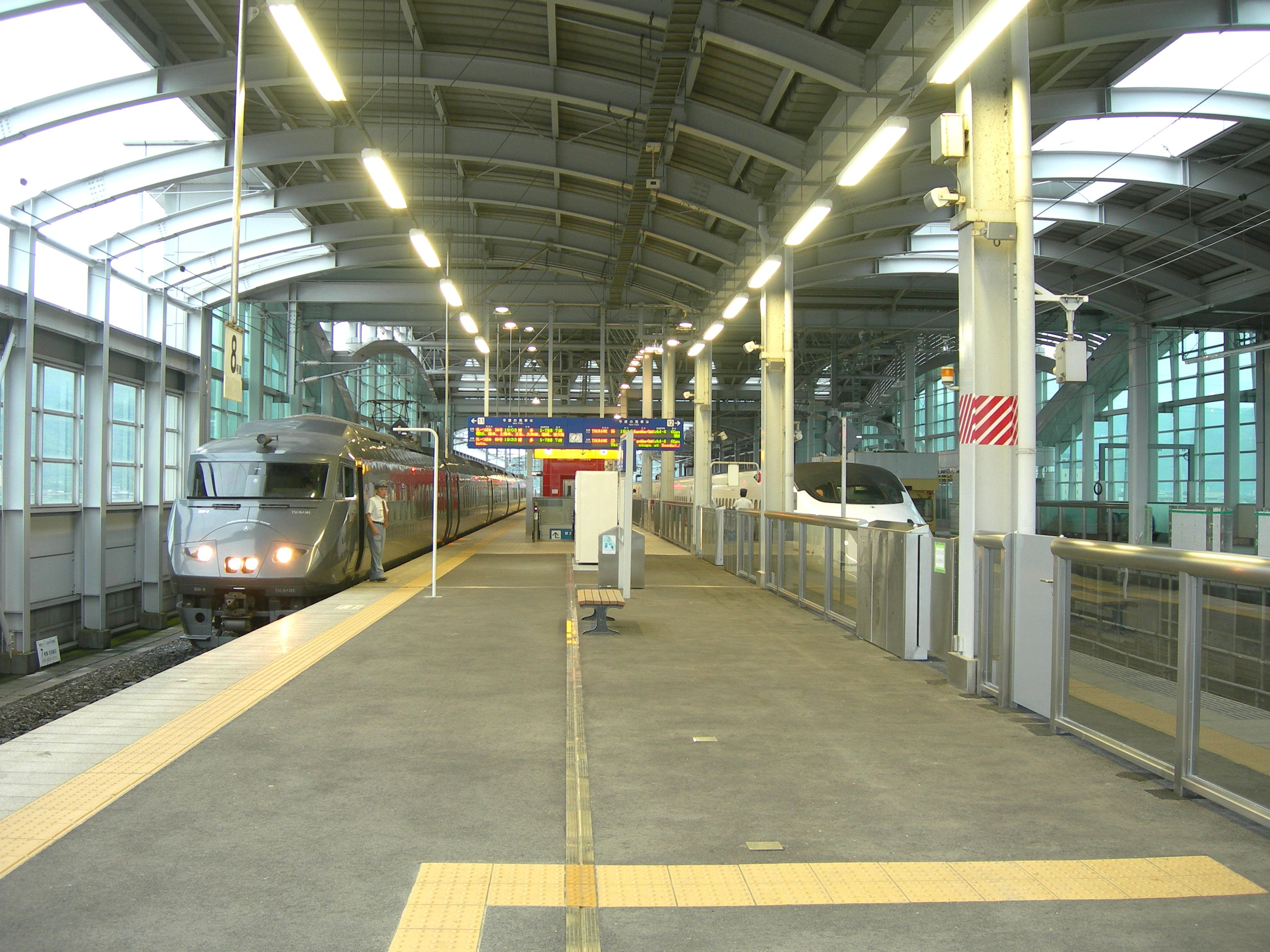 新八代駅ホーム